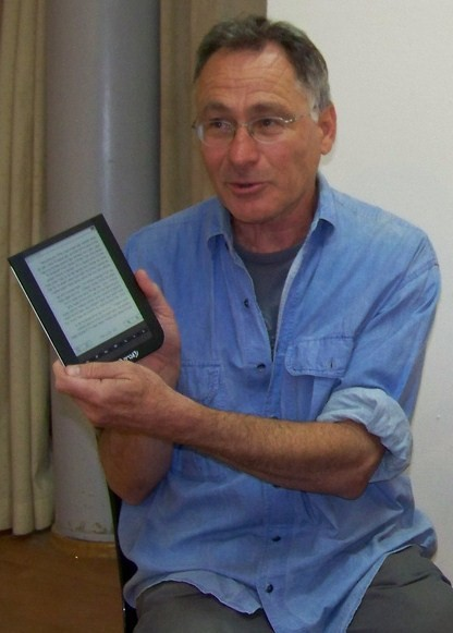 השקת "עברית", הקורא האלקטרוני של ידיעות טכנולוגיות, ניופאן וסטימצקי, ב"בית ביאליק" בתל אביב, 26.5.2010.